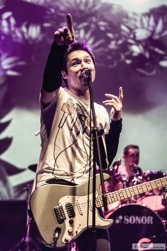 Концерт BIG POP-PUNK GIG!